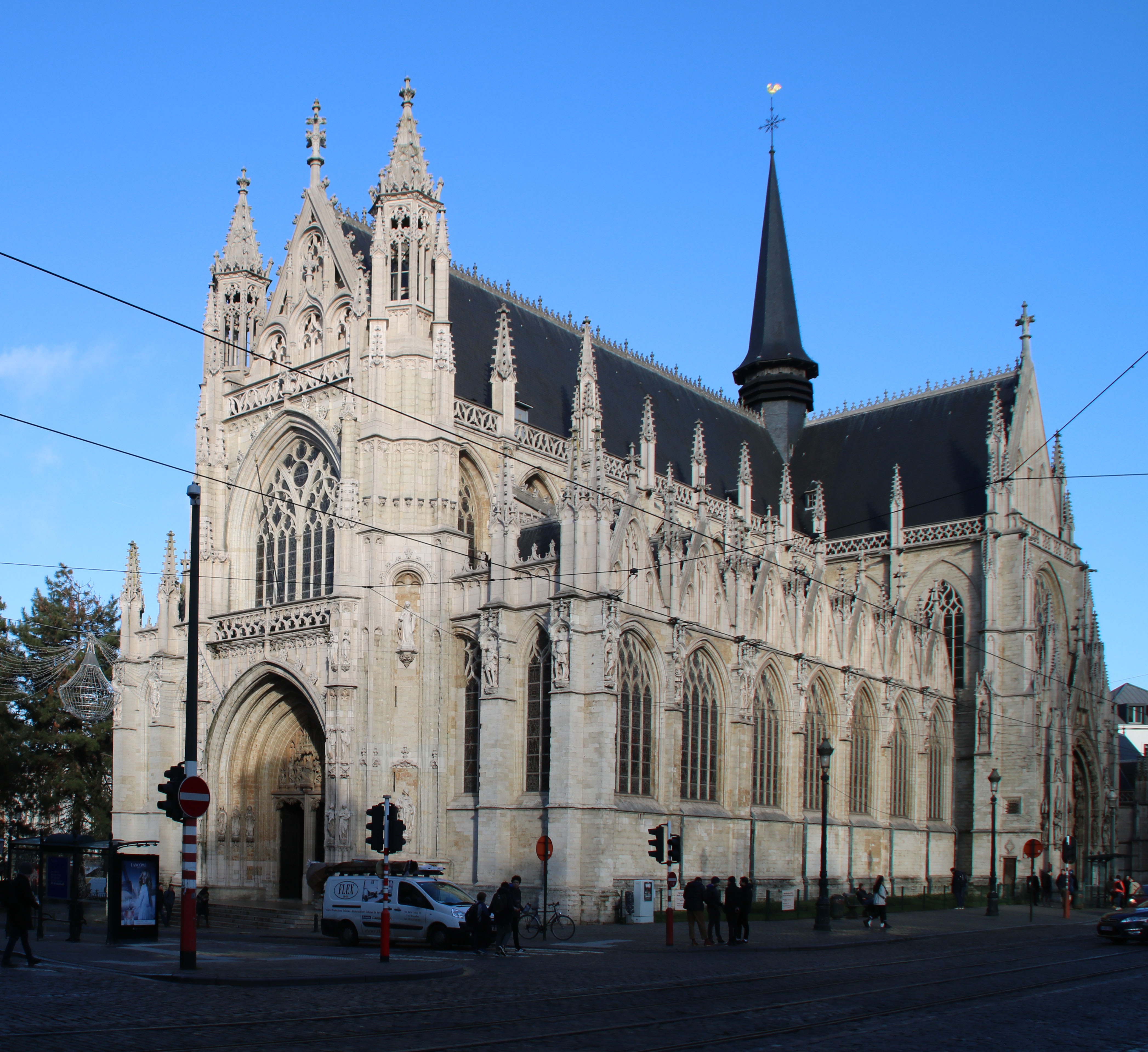 Eglise du Sablon à bruxelles